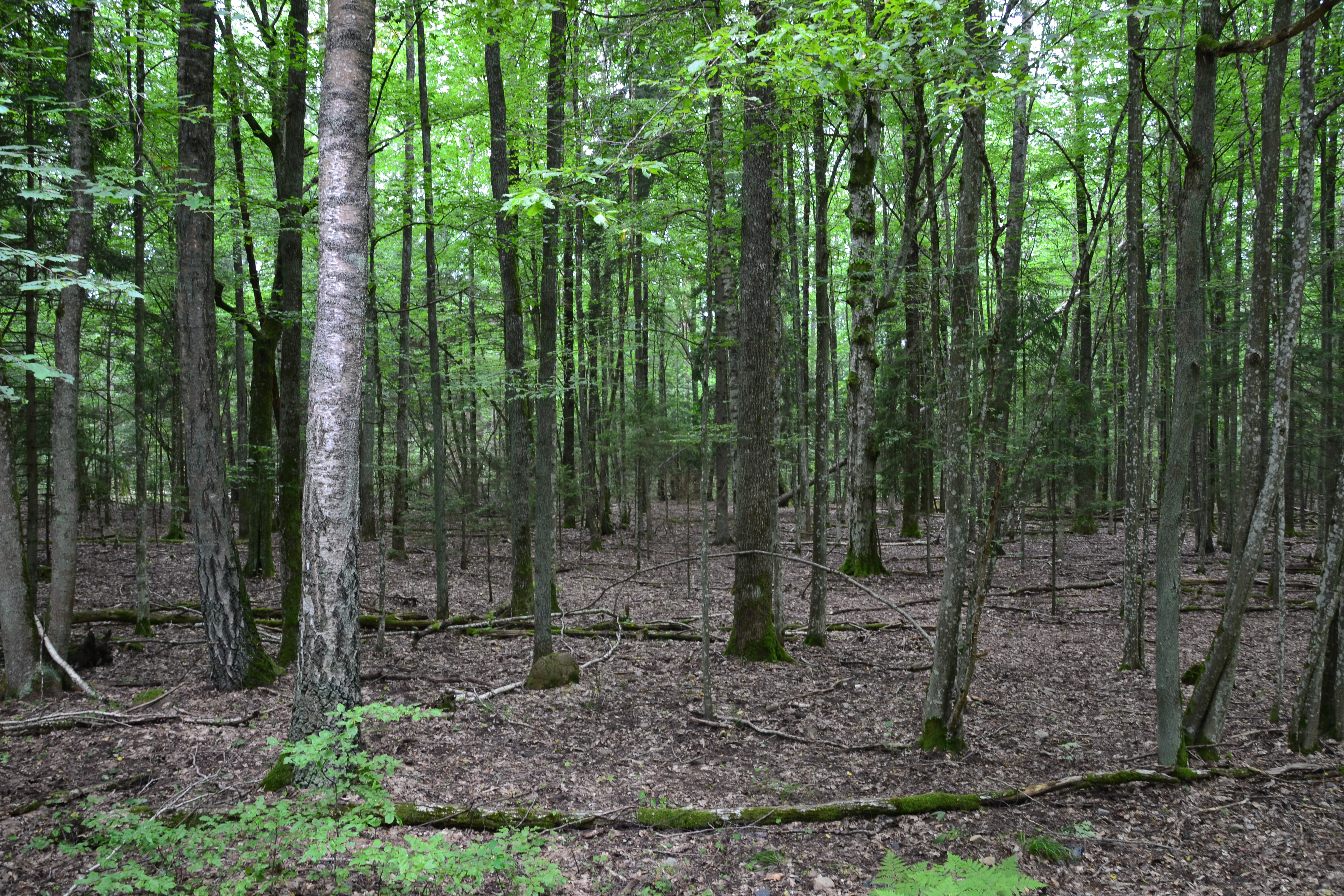 Eiken-linden-haagbeukenbos in een strikt beschermde zone binnen N.P. Belavezjskaja Poesjtsja, Oblast Brest, Wit-Rusland.